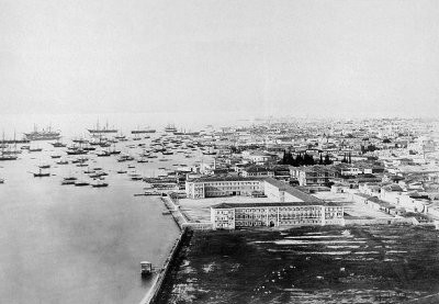 General view of :en:Konak, İzmir Square, İzmir, Turkey, 1865